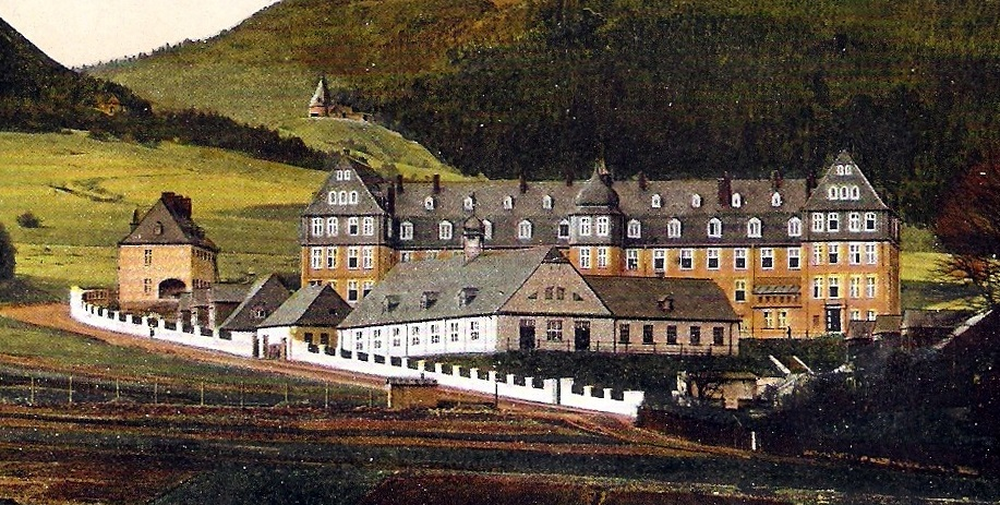 Goslar, Rammelsberg-Kaserne (erbaut 1912-1914) auf einer Postkarte aus dem Eröffnungsjahr